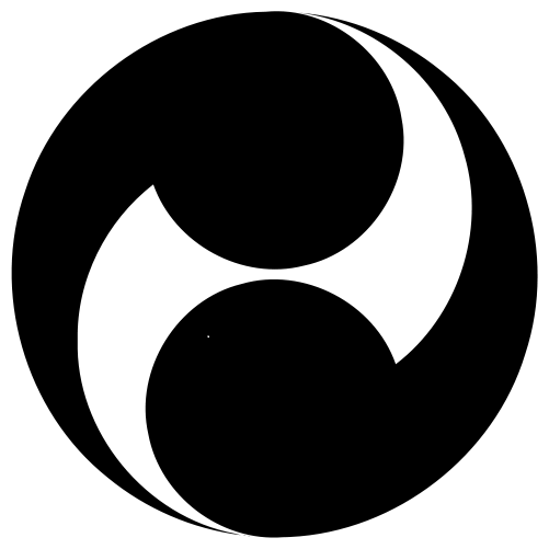 小山藩の正しい家紋です。 【二つ頭左巴】